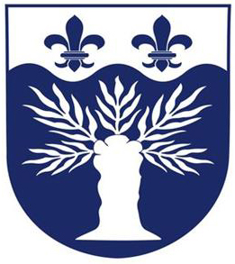 znak obce Milotice nad Bečvou